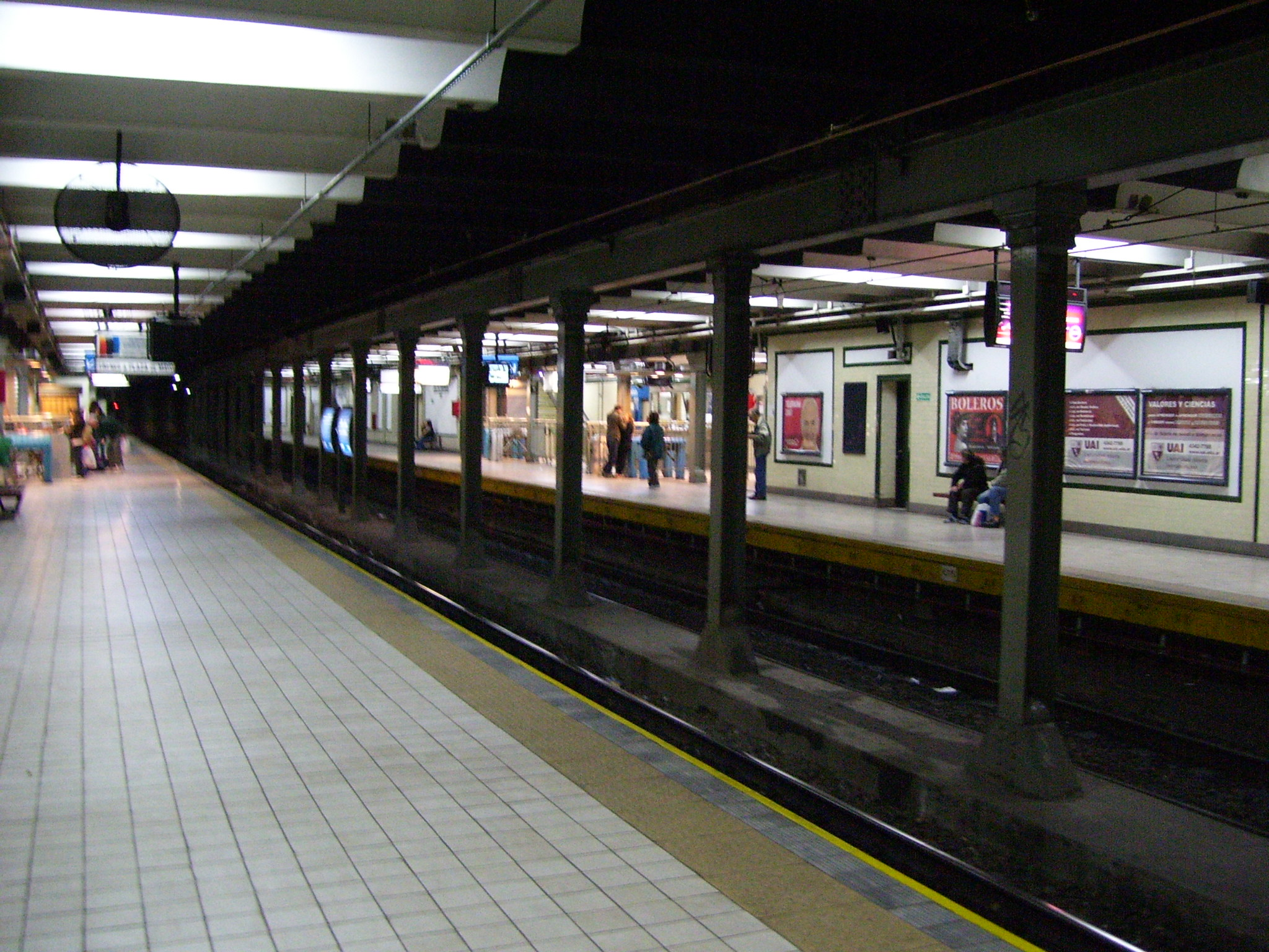 Estación Castro Barros. Línea A. Buenos Aires, Argentina